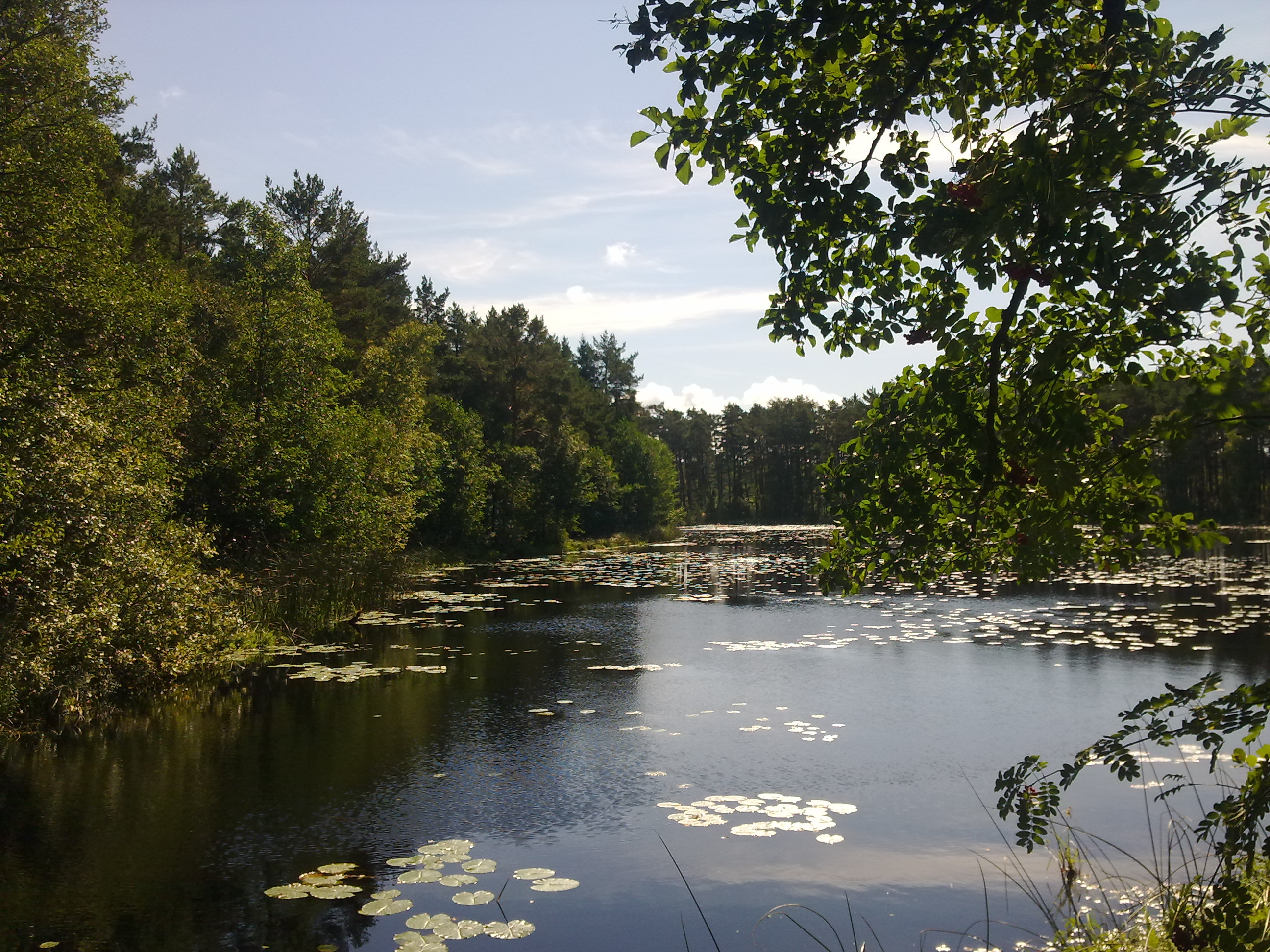 Allikajärv Nõva puhkealal